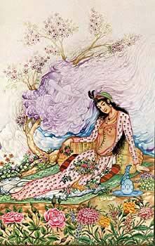 Миниатюра Хуссейна Бехзада (1894-1968).